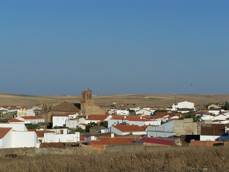 Vistas de Calzadilla de los Barros